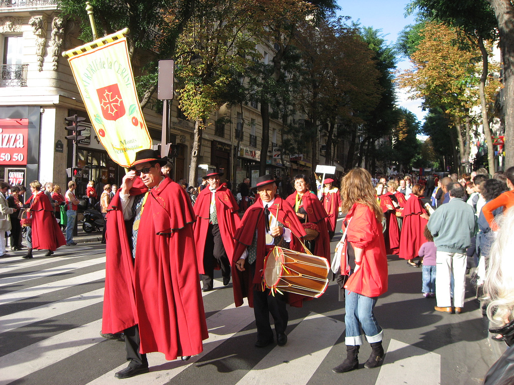 Confrérie de la cerise de Venasque à Montmartre